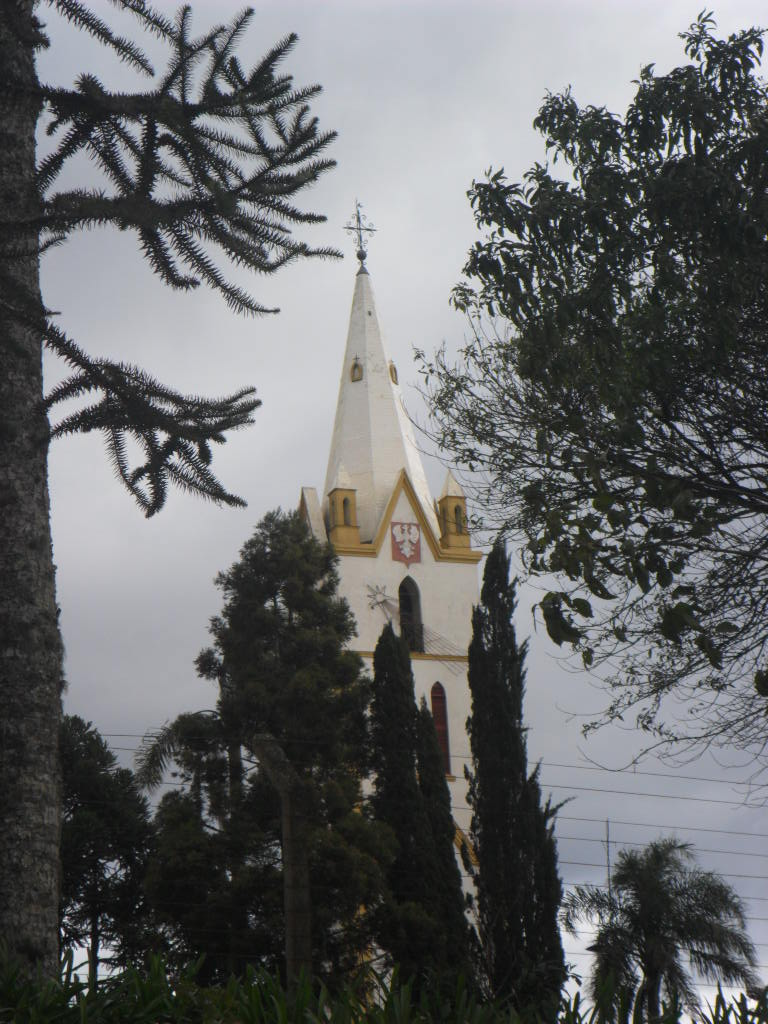 Igreja de Santo Estanislau, Itaiópolis, Santa Catarina